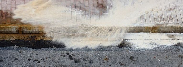 המשכה